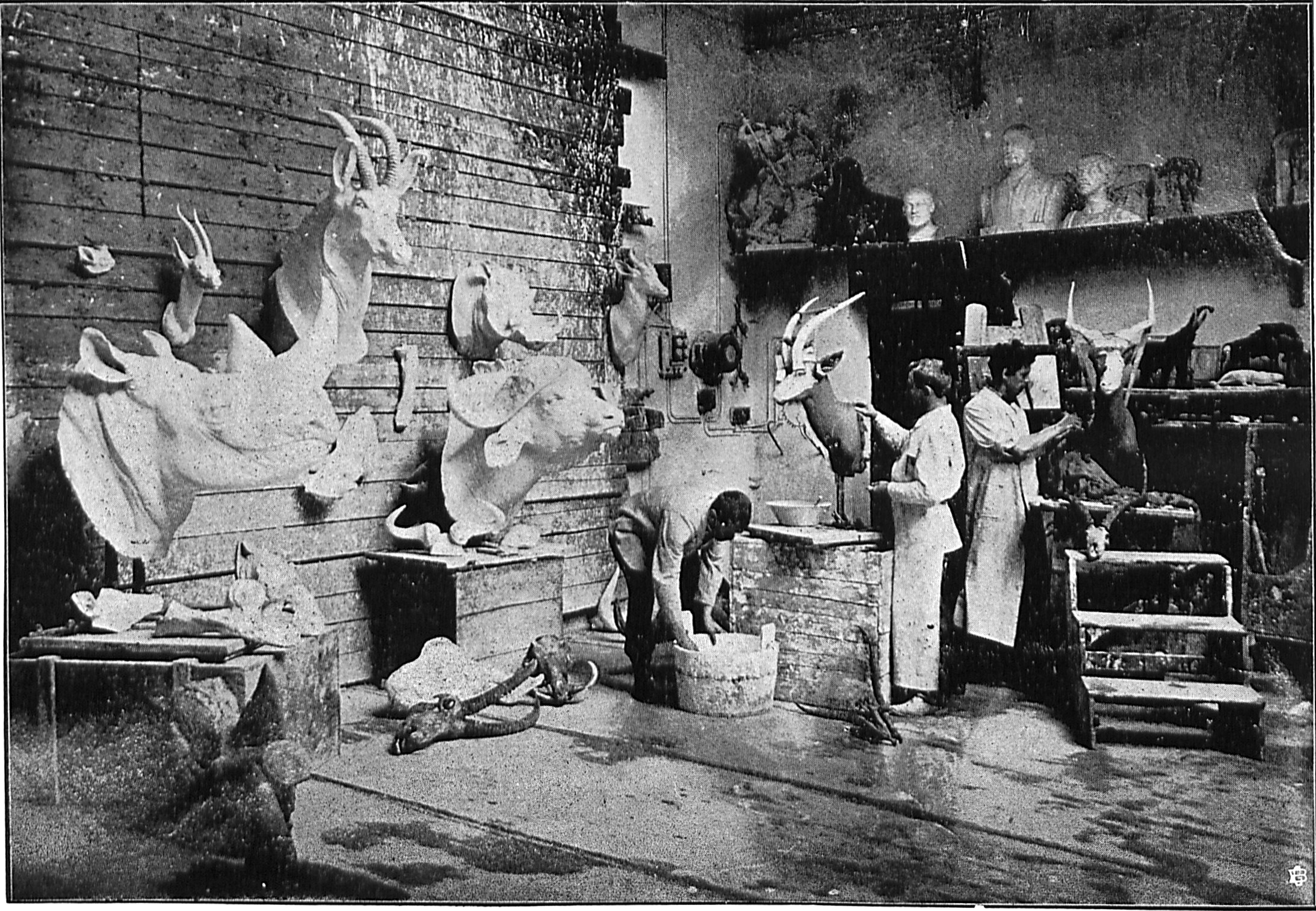 Naturabgüsse selbsterlegter Tiere von den afrikanischen Reisen Behns.